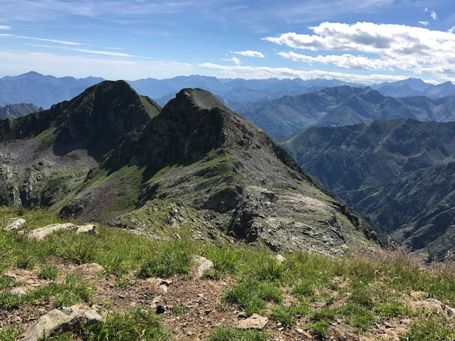 Vue de la cima Lago et de la cima Altemberg.